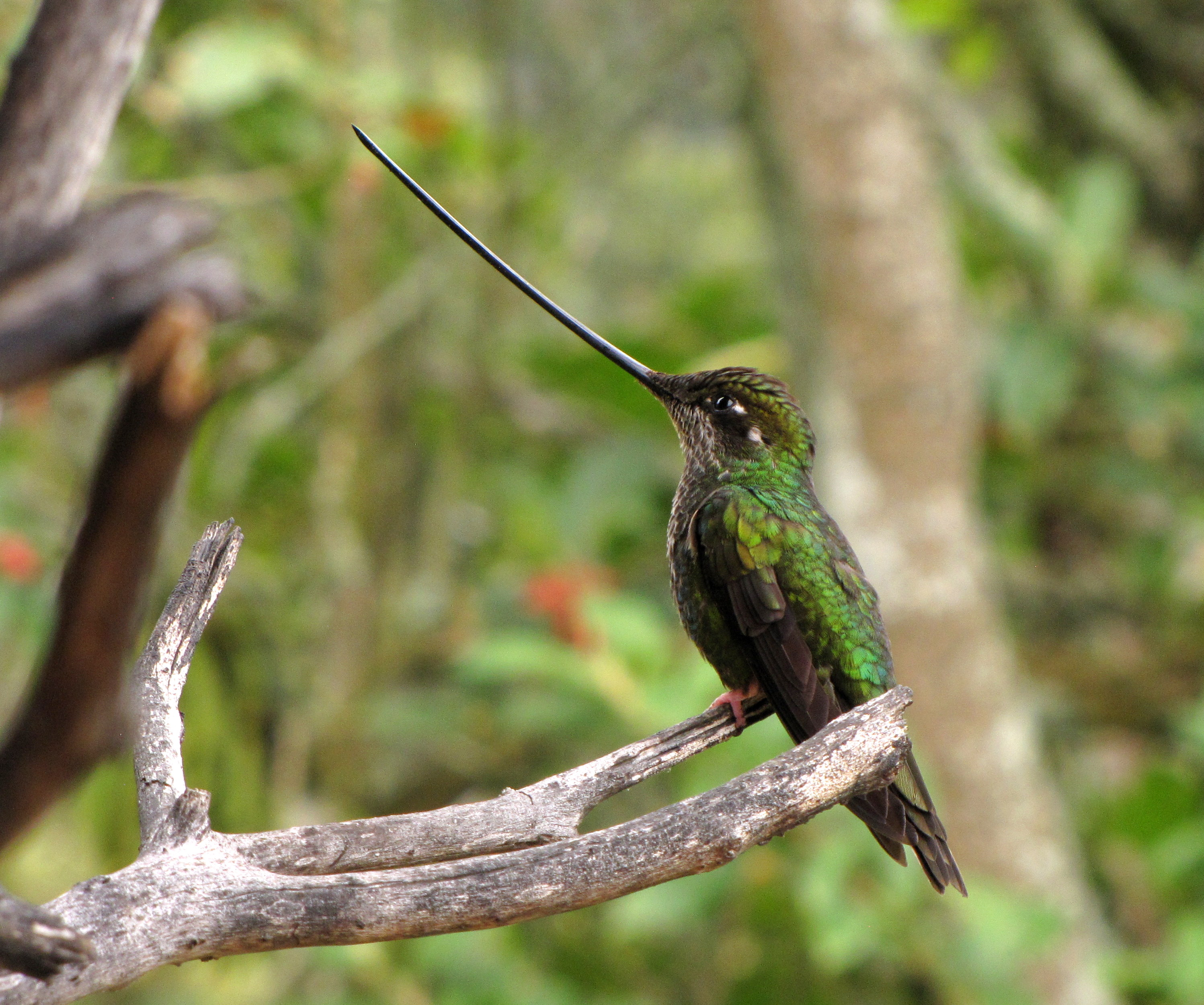 Ensifera ensifera (Pico de sable)